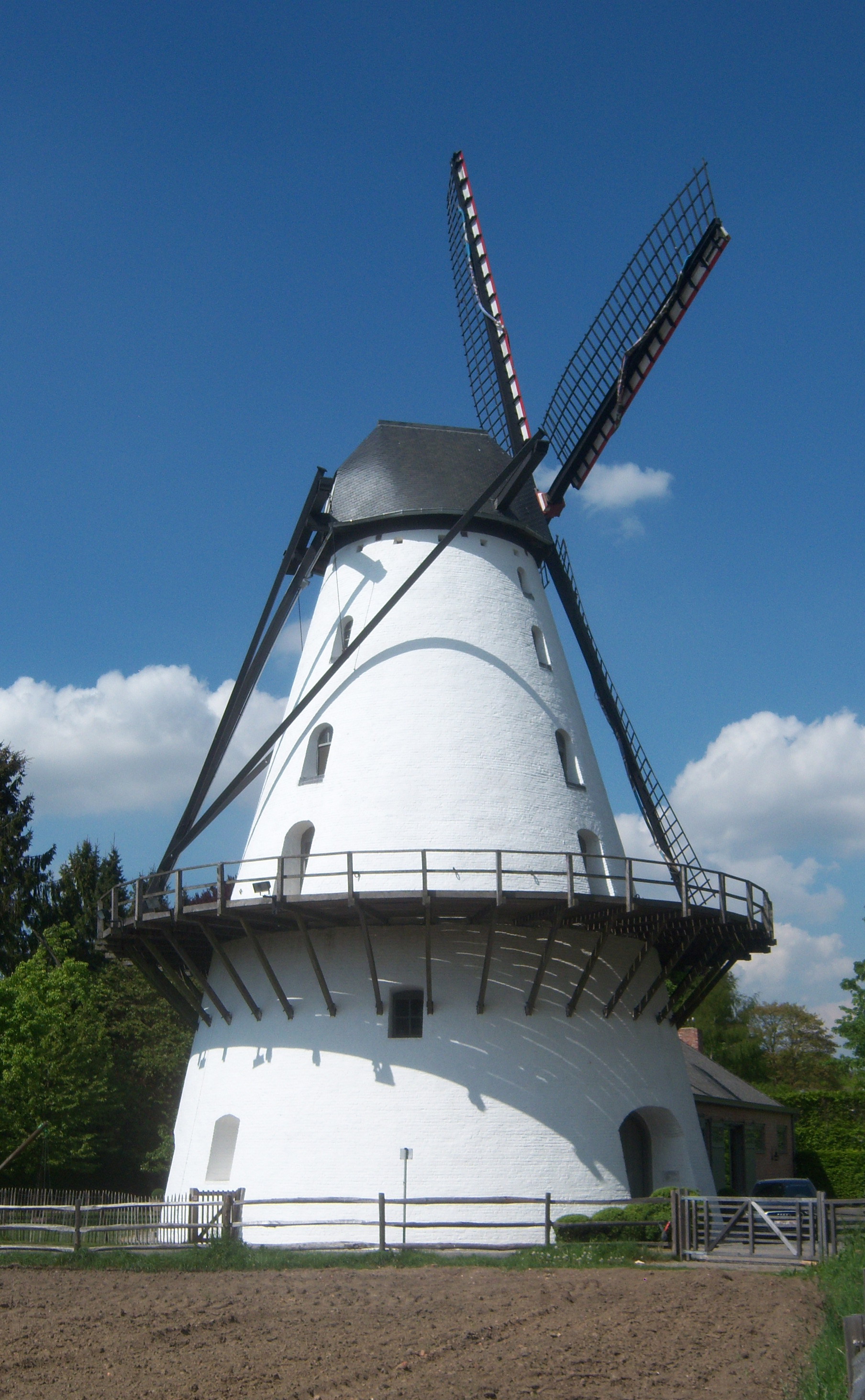 Den Steenen Molen te Boechout, provincie Antwerpen